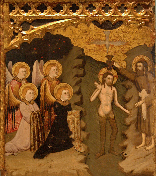 Bateig de Crist. Compartiment del retaule del Sant Esperit. Procedent de Sant Miquel de Cardona. 1410?. Museu Diocesà i Comarcal de Solsona, Solsonès (Catalunya, Espanya)